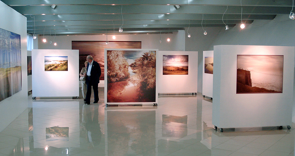 Interior da Galeria Municipal de Arte Gerd Bornheim, na Casa de Cultura Percy Vargas de Abreu e Lima, em Caxias do Sul, Brasil, com exposição fotográfica de Ricardo Frantz